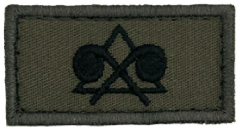 ABC-Schutz